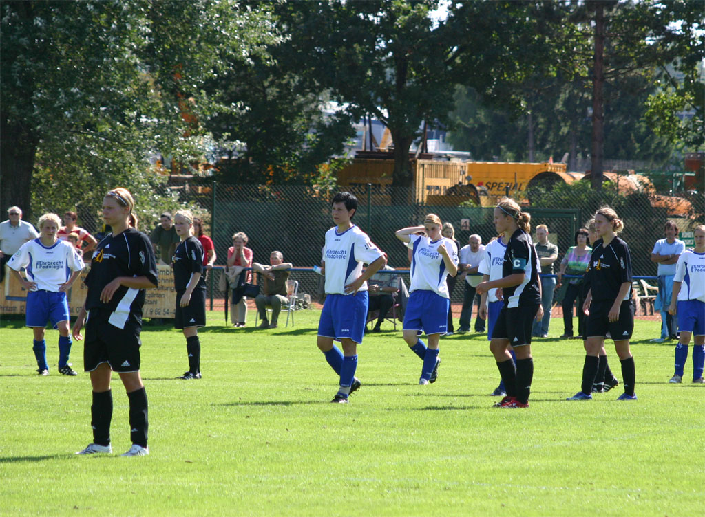 ASV Hagsfeld - SC Regensburg 01